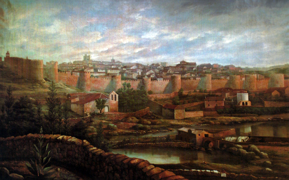 Ávila.